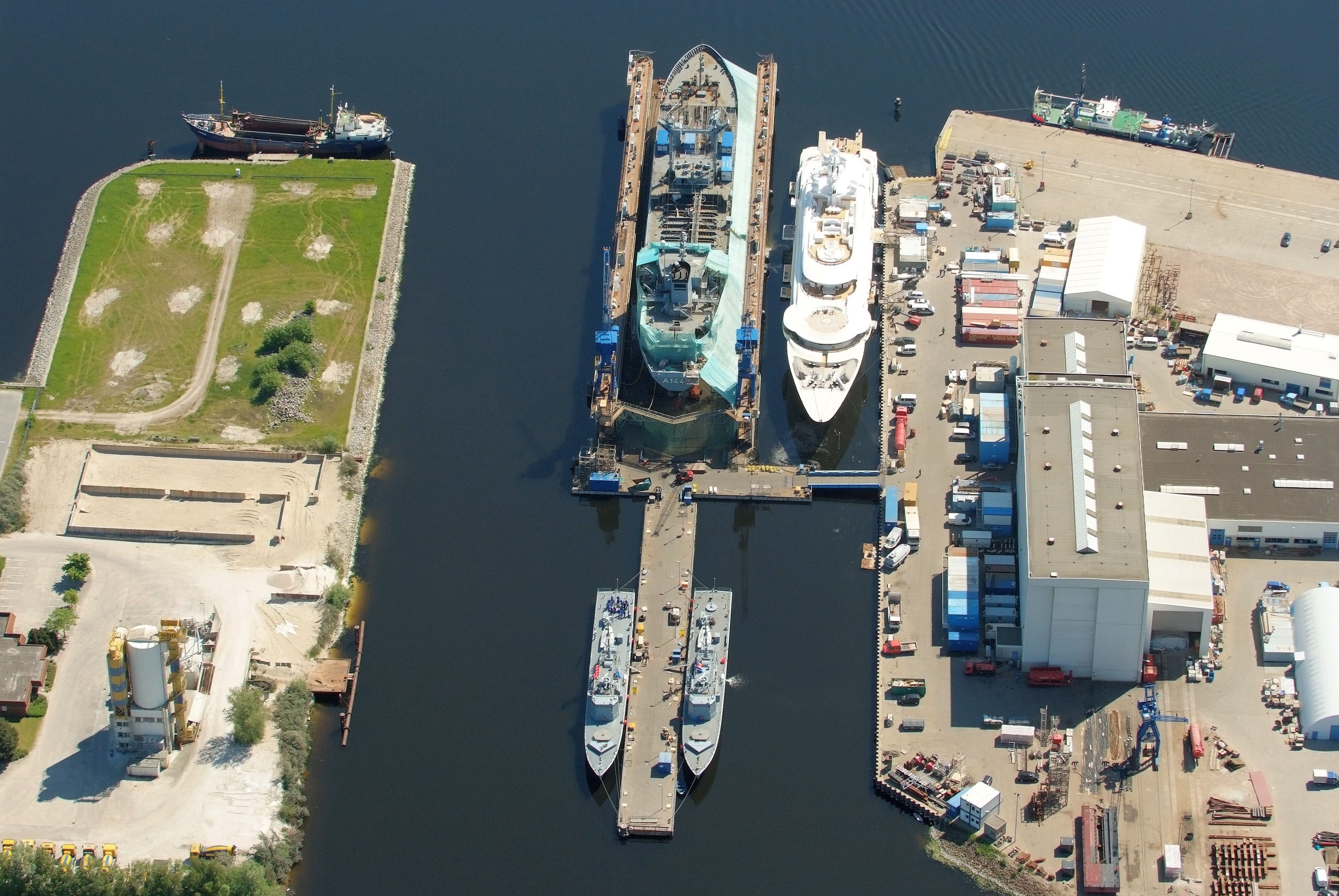 Fotoflug vom Flugplatz Nordholz-Spieka über Cuxhaven und Wilhelmshaven